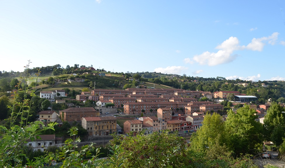 Vista de Tuilla (Langreo, Asturias) desde la Senda de El Trole